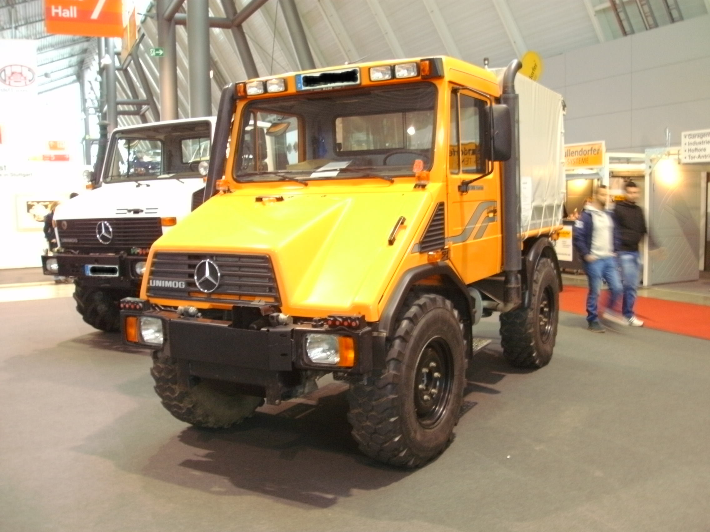 Unimog U90 turbo auf Retro Classics Stuttgart 2014